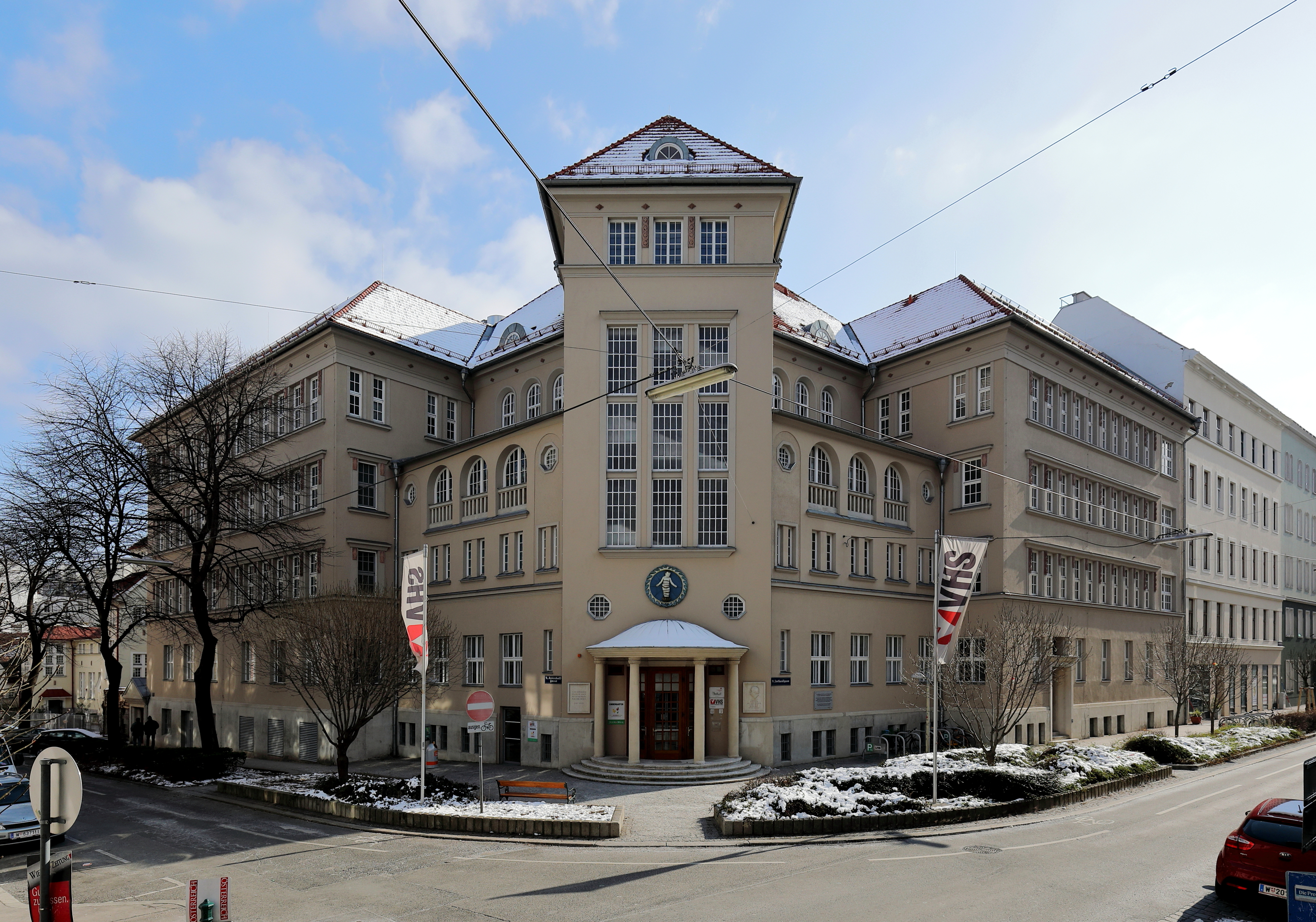 Das Julius-Tandler-Familienzentrum an der Ecke Lustkandlgasse/Ayrenhoffgasse im 9. Wiener Gemeindebezirk Alsergrund. Der L-förmige Eckbau in Heimatstilformen wurde ab 1923 auf Initiative von Stadtrat Julius Tandler nach Plänen von Adolf Stöckl errichtet und am 18. Juni 1925 als Kinderübernahmestelle der Stadt Wien eröffnet. Ab 1964 erfolgte ein Umbau sowie eine Renovierung des Gebäudes und am 22. November 1965 die Eröffnung als Julius-Tandler-Heim.